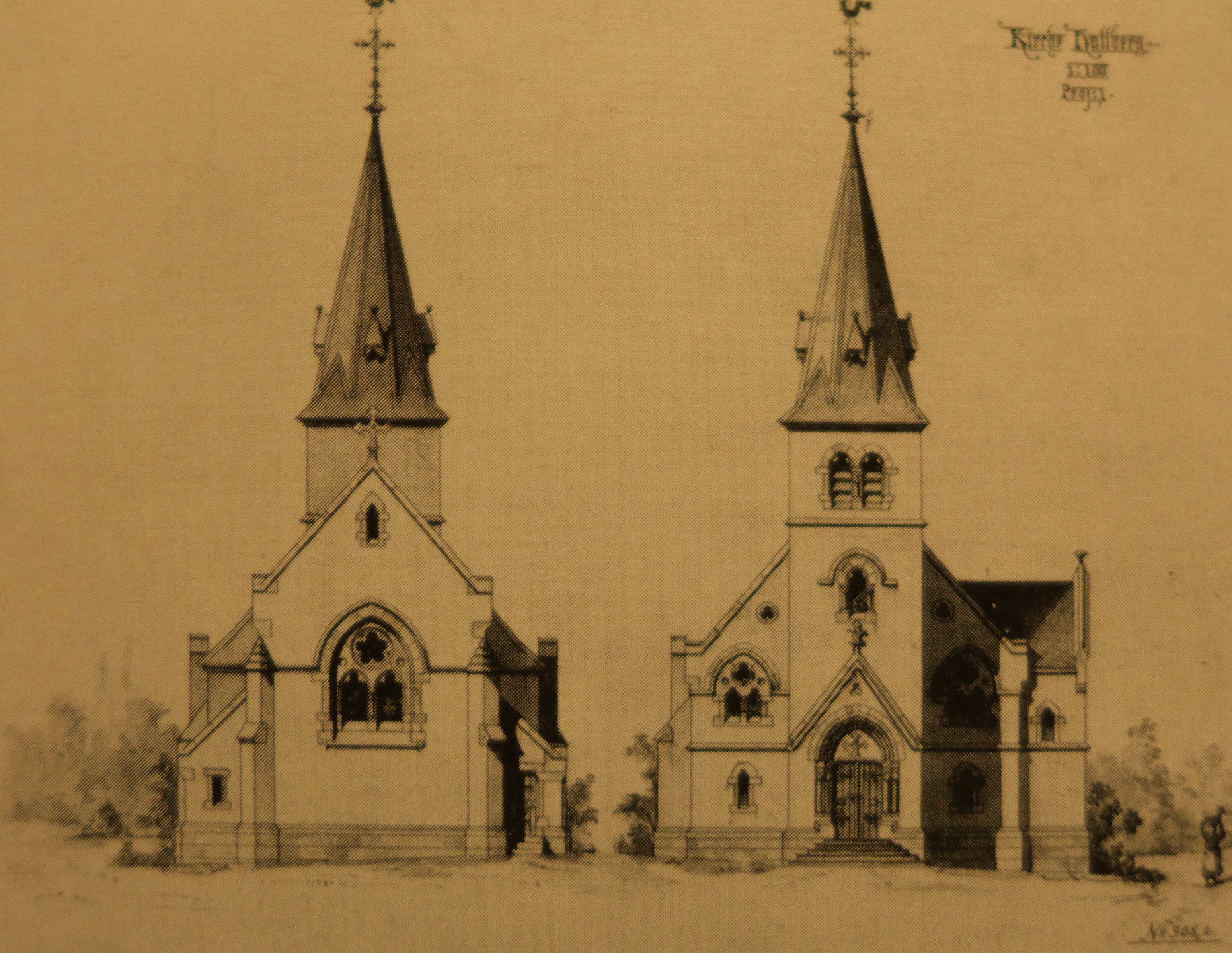 Stumm-Kirche, Neogotischer Entwurf, Apsis und Front